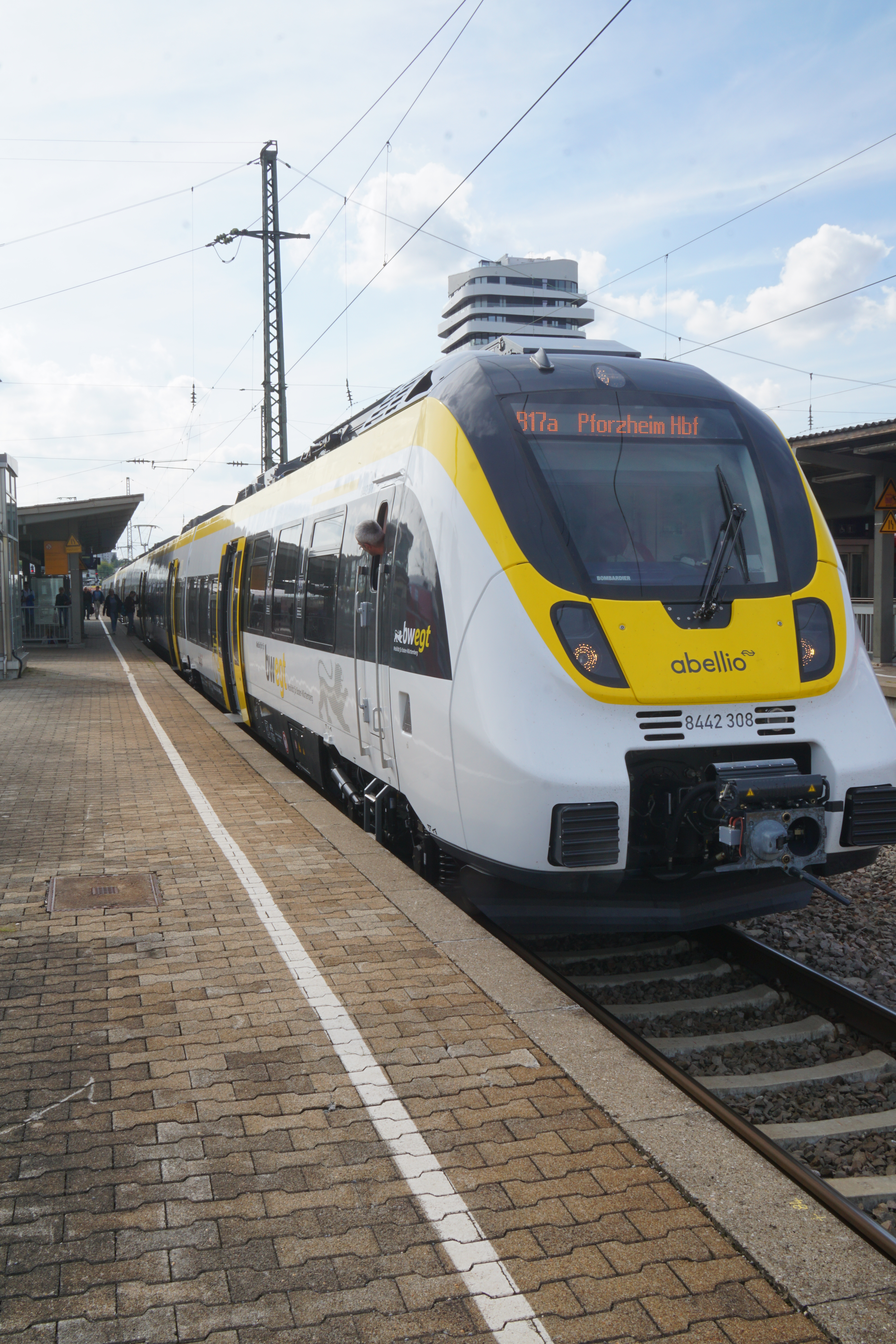 Bahnhof Bietigheim-Bissingen